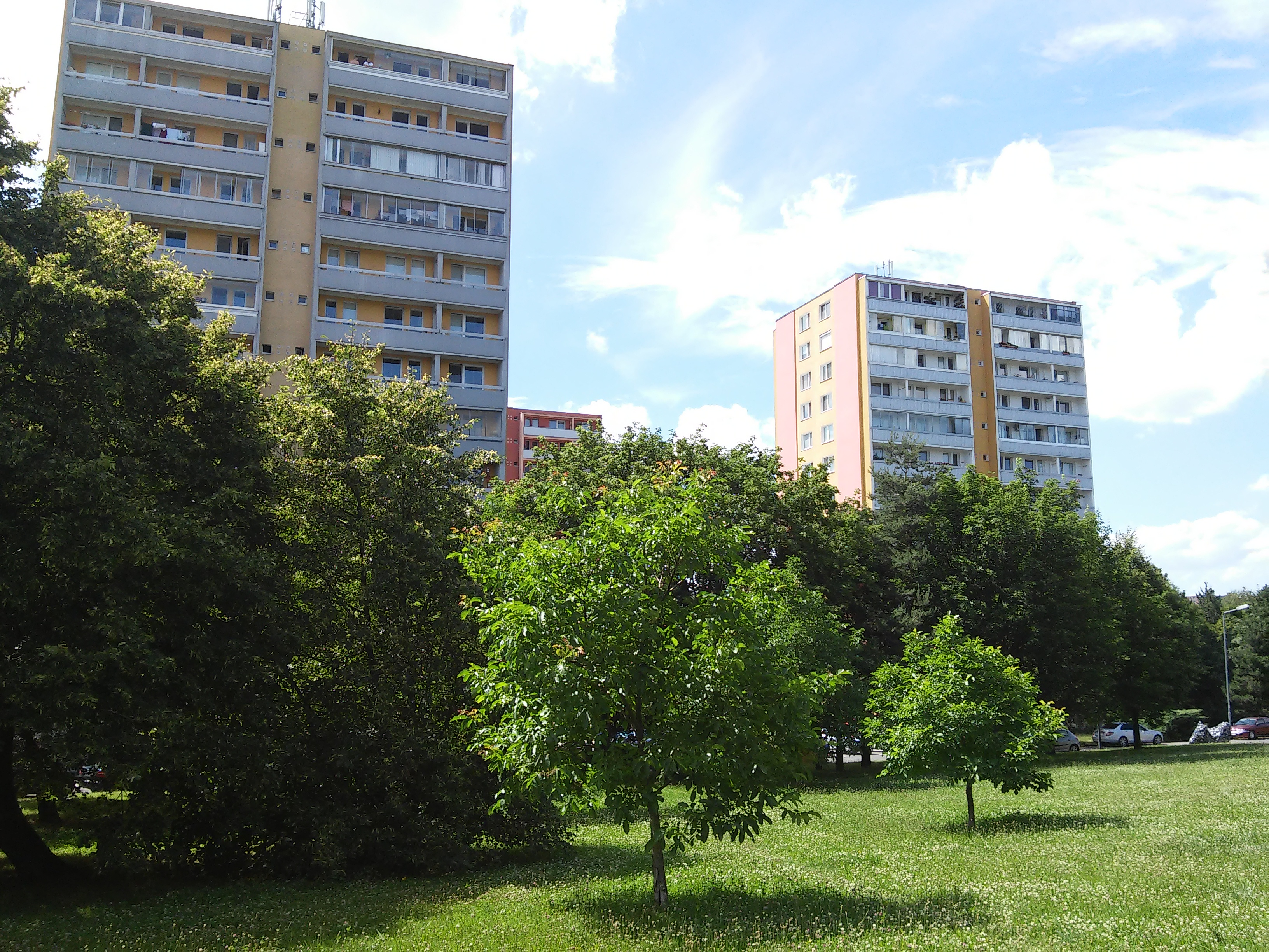 Húščavova, Dúbravka, Bratislava